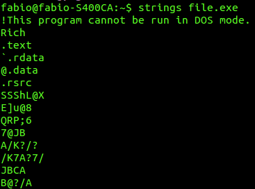 Strings Command